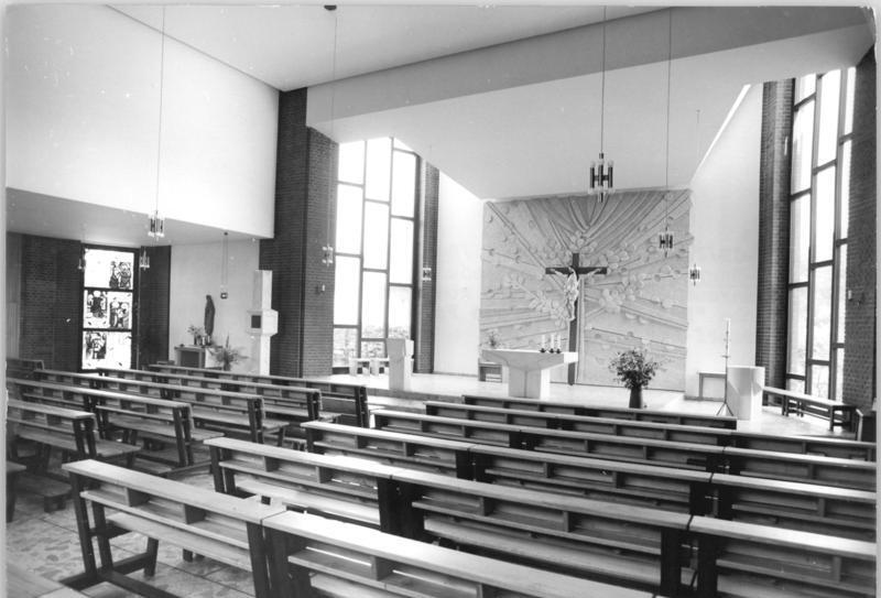 ADN-ZB Junge-26.9.1984 Berlin: Neue Kirche in der DDR-Hauptstadt-Hell und modern präsentiert sich der Innenraum der neuerbauten römisch-katholischen Pfarrkirche "Maria, Königin des Friedens" im Wohngebiet Biesdorf-Nord.